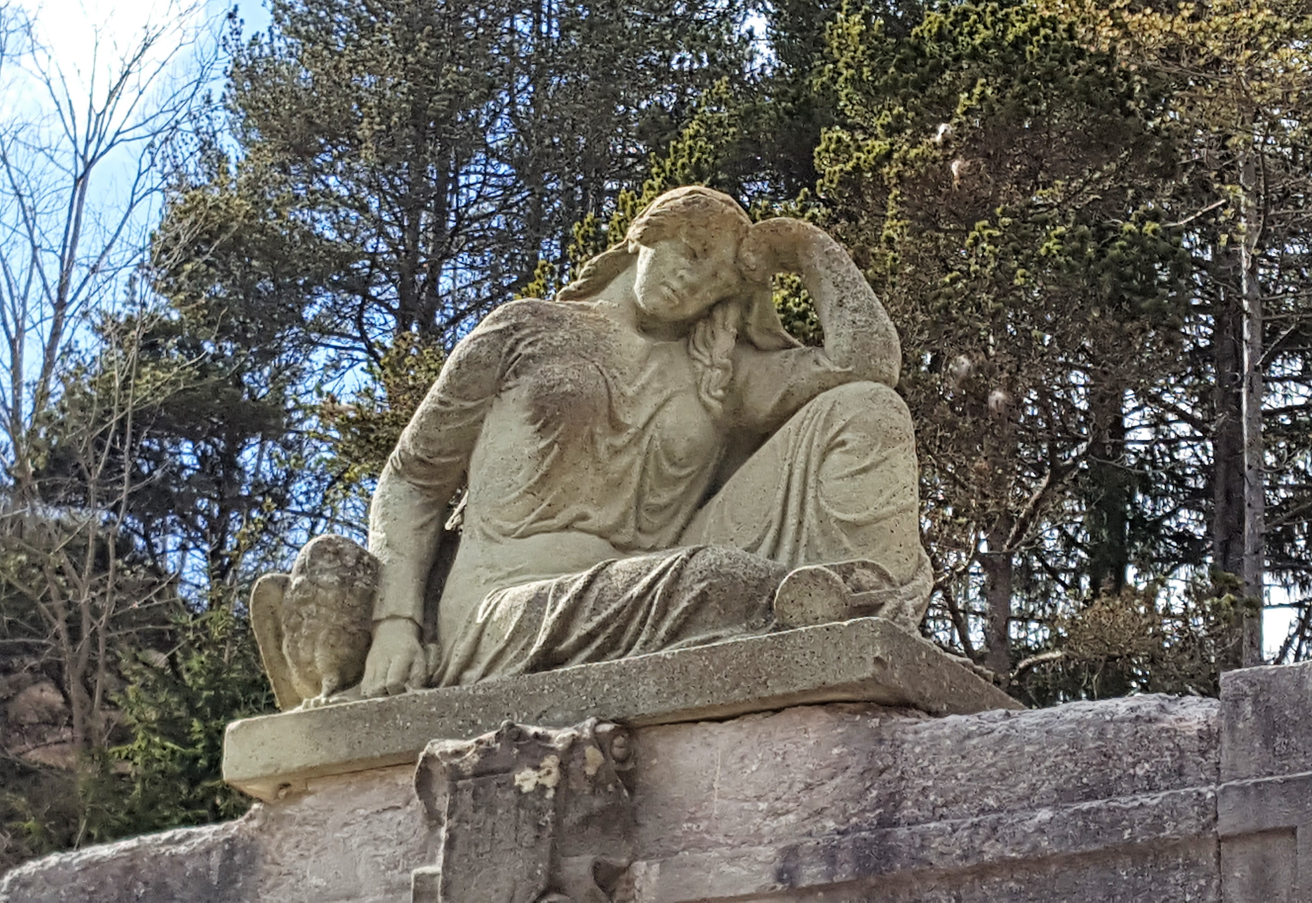 Joaquim Claret: Repos (Ruhe, auf dem Eingangsportal des Friedhofs von Camprodon, Katalonien, Kopie der Originalskulptur von 1916)